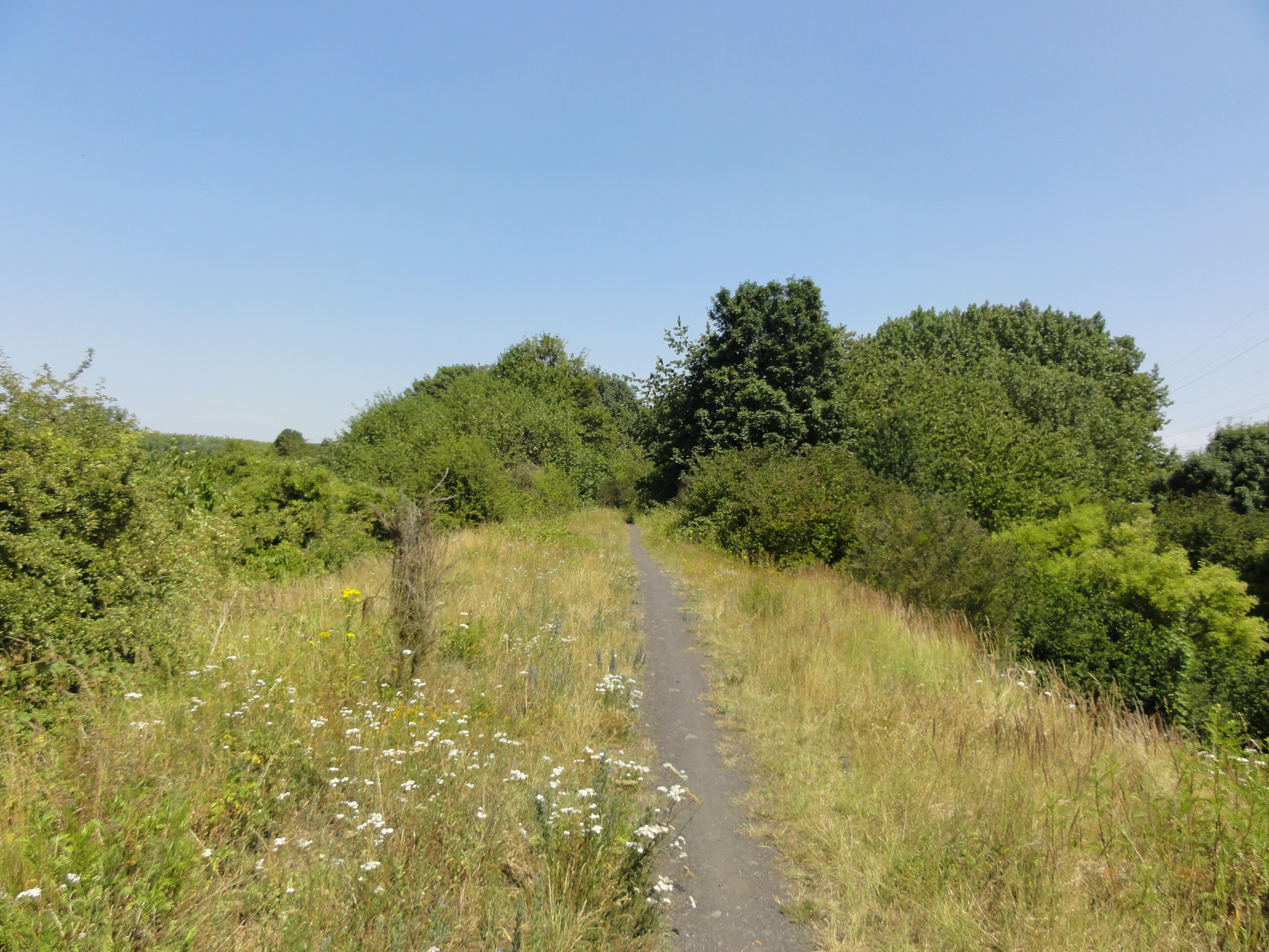 Terril n° 213D dit Cavalier de Roost-Warendin, Compagnie des mines de l'Escarpelle dans le bassin minier du Nord-Pas-de-Calais, Auby, Nord, Nord-Pas-de-Calais, France.